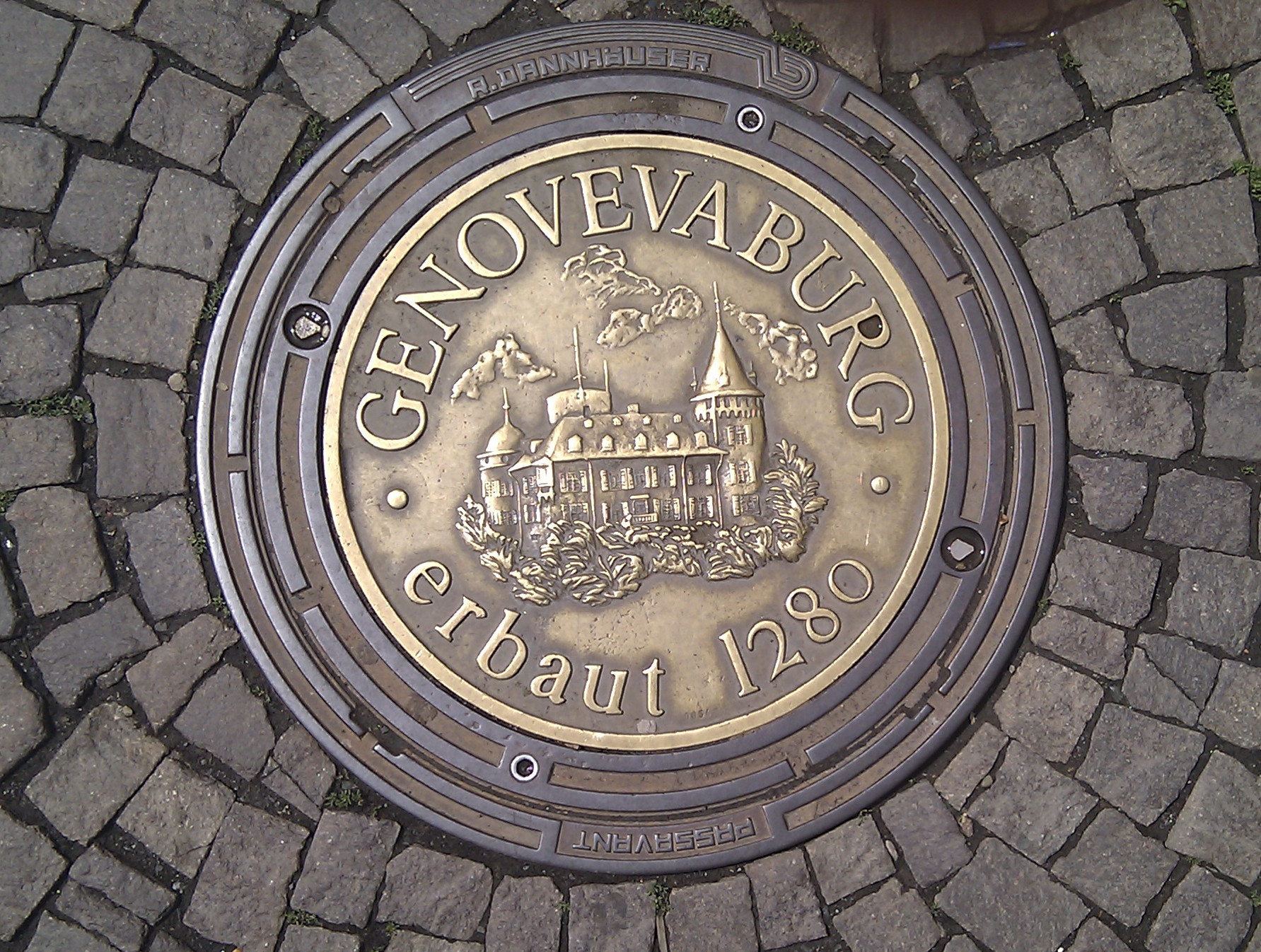 Schachtdeckel in Mayen mit der Genovevaburg, erbaut 1280